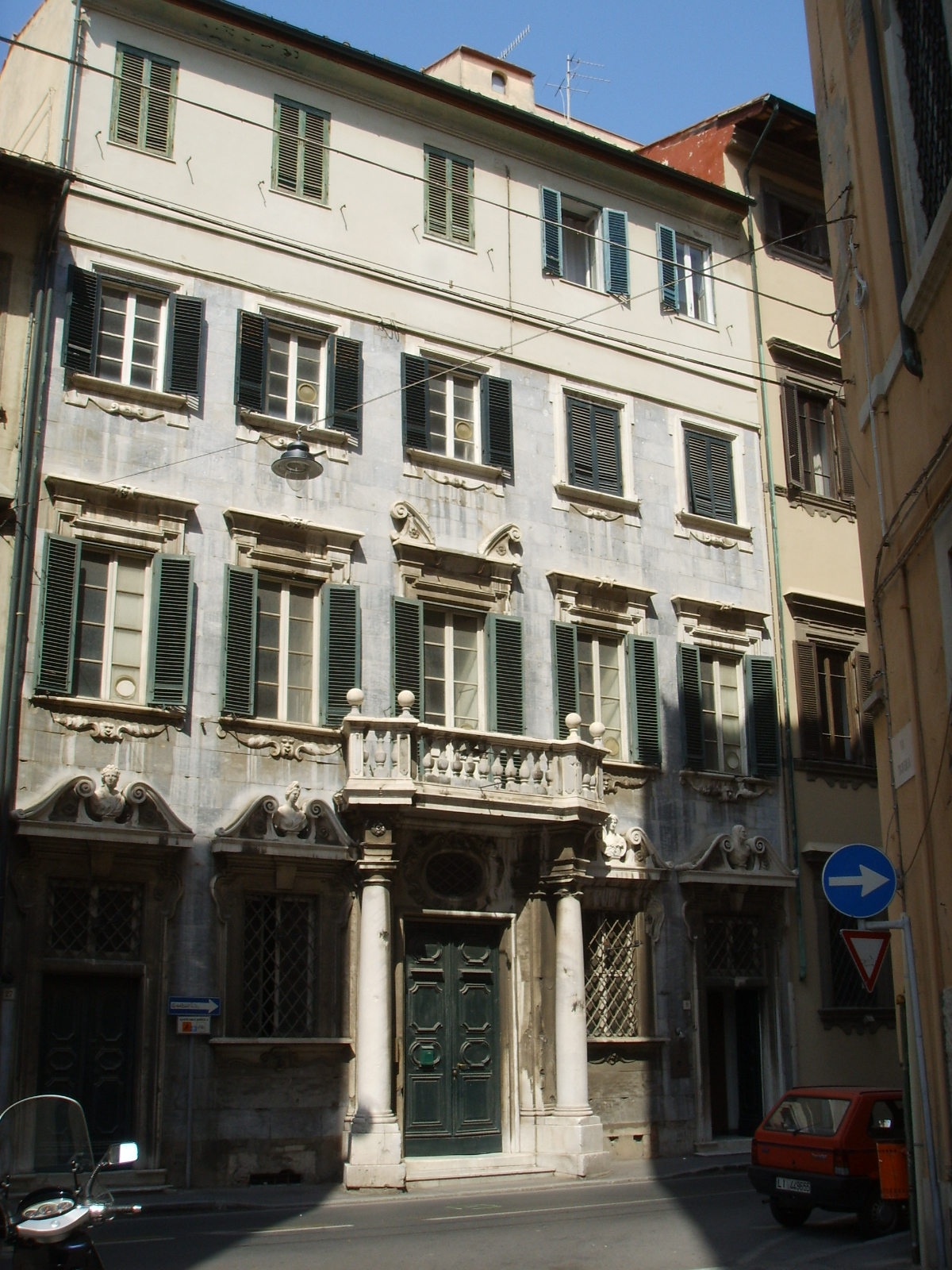 Livorno: il Palazzo delle Colonne di marmo, via Borra 29 Livorno risalente al XVIII secolo.